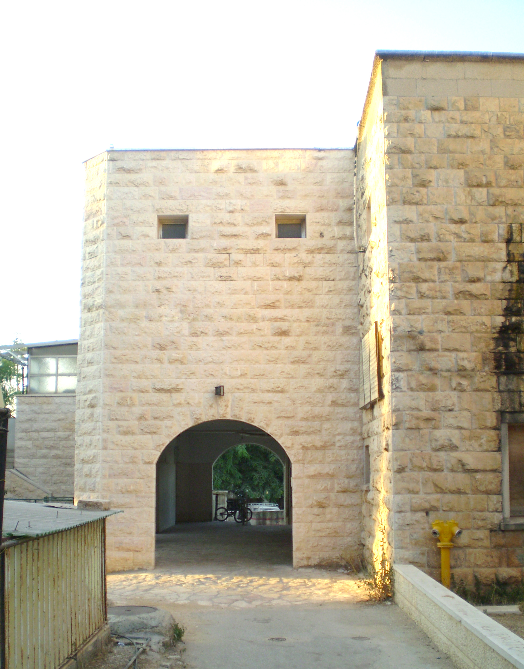 בית הכנסת פאג"י בסנהדריה